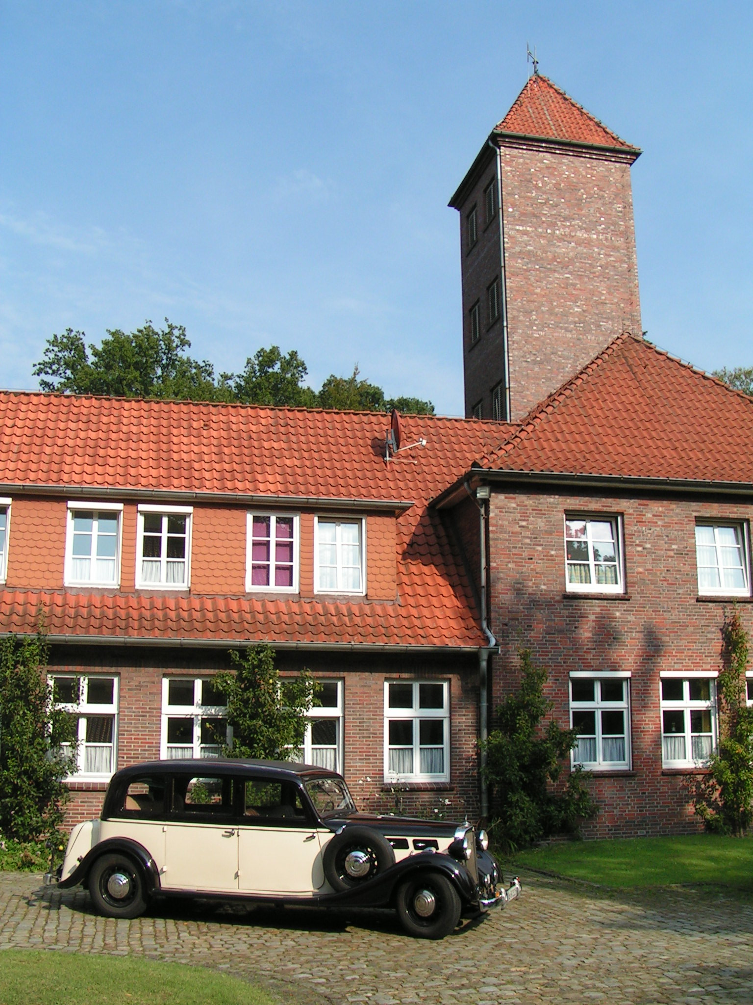 Niedersächsische Landes-Feuerwehrschule Loy